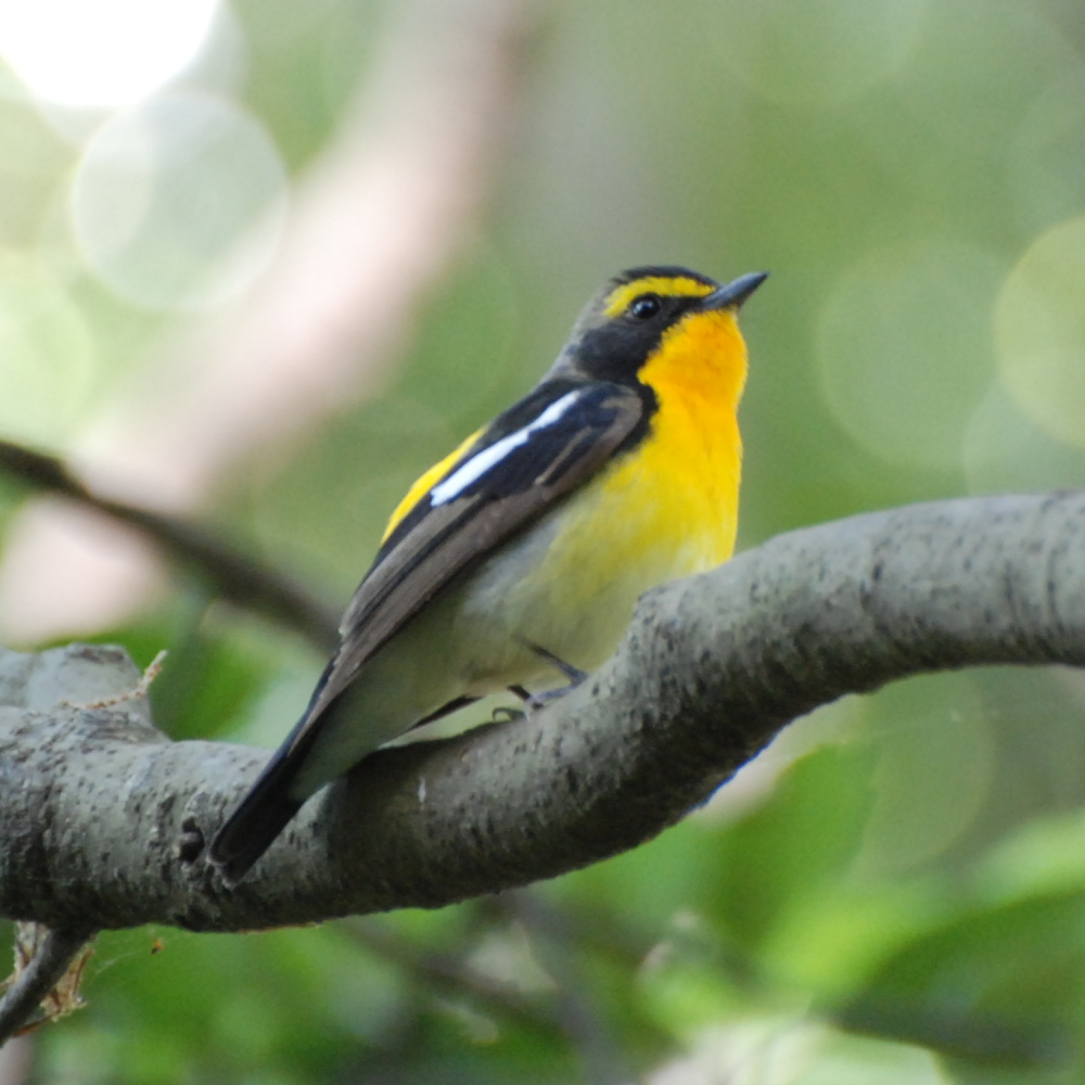 Ficedula narcissina